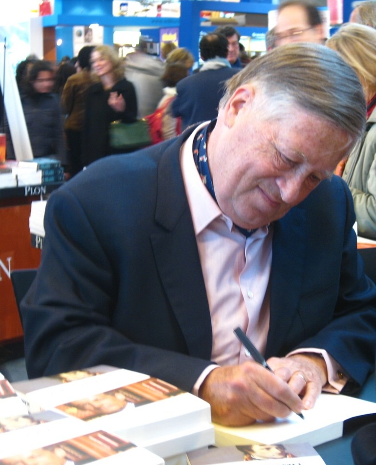 Alain Duhamel dédicaçant un ouvrage lors du Salon du Livre de Paris le 14 mars 2009.